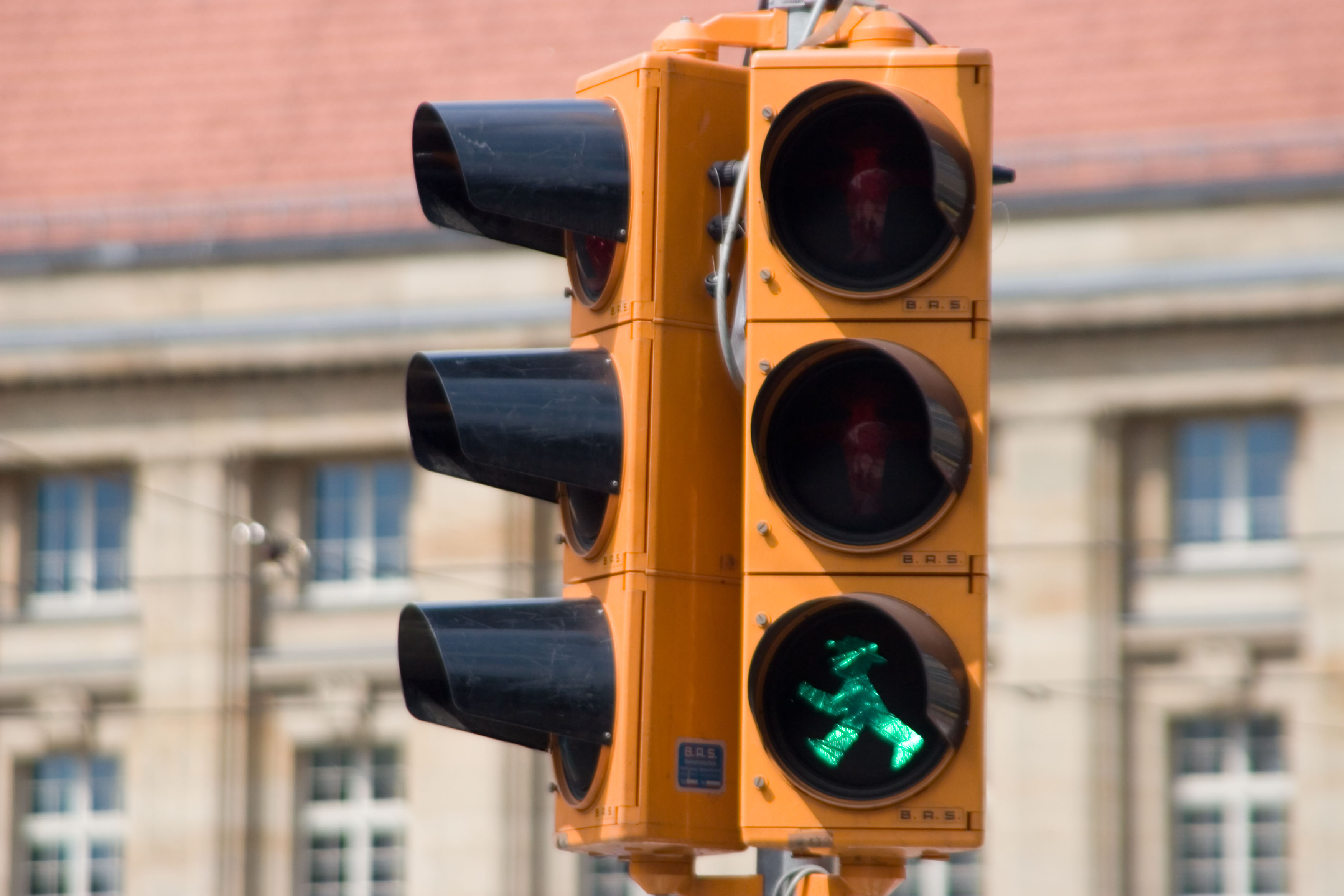 Ampelmann , blue